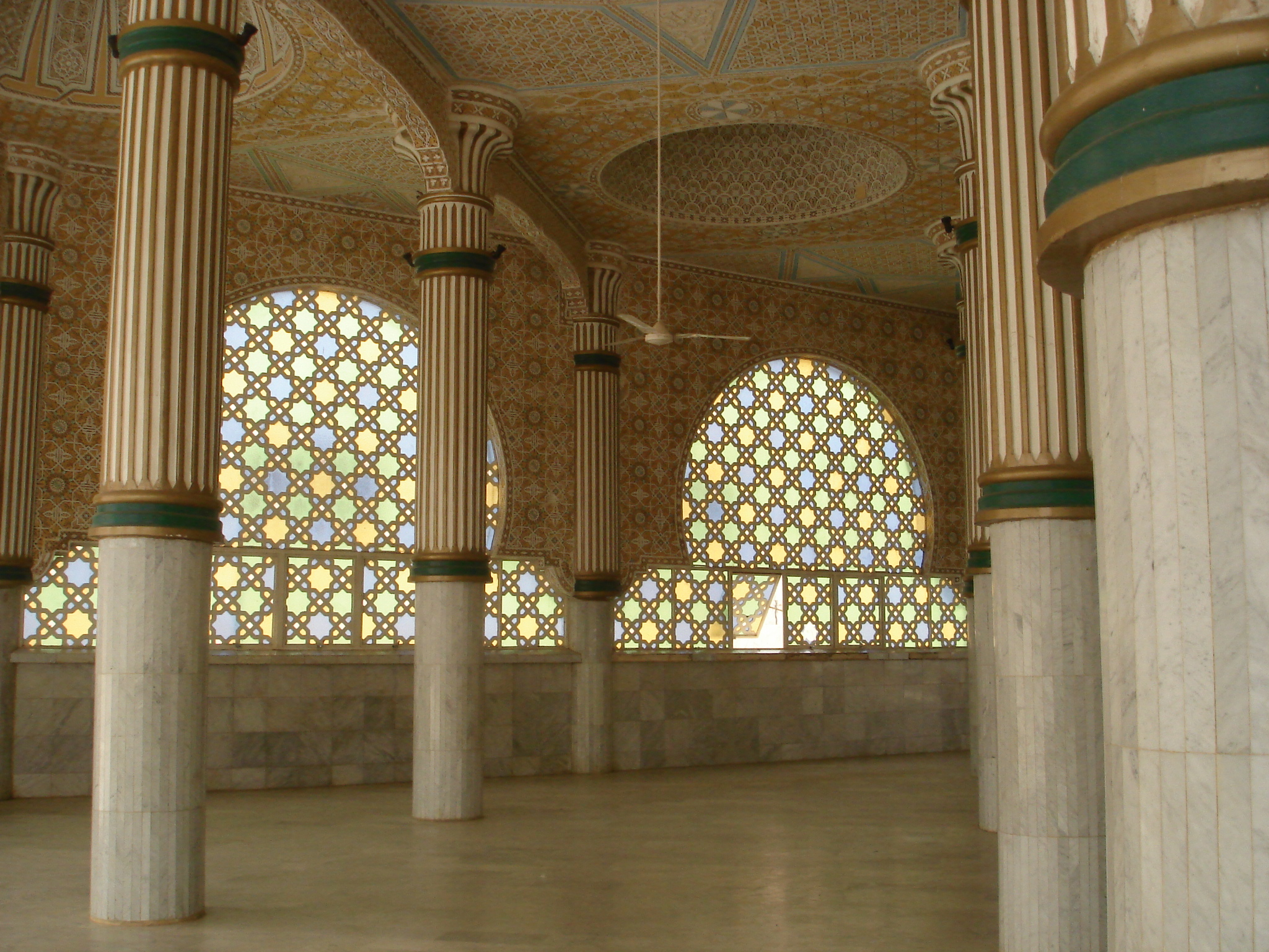 Intérieur de la mosquée de Touba